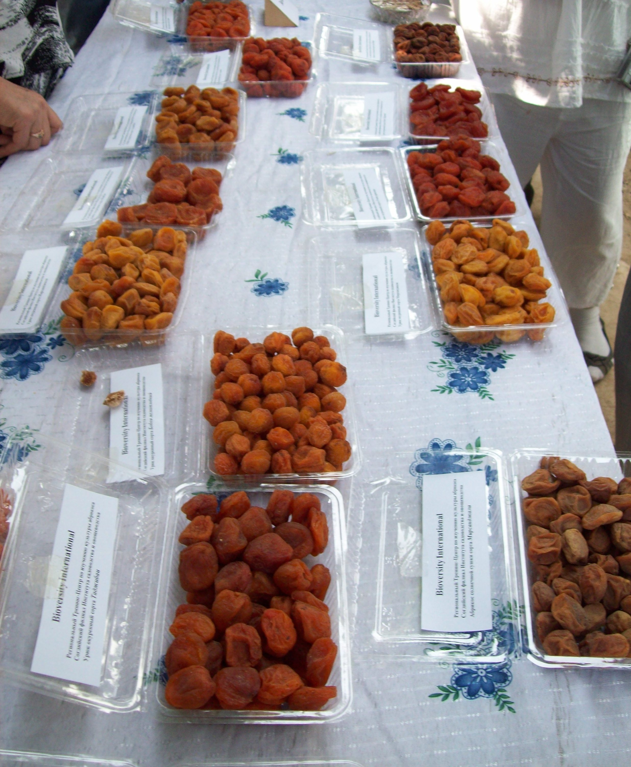 Сухофрукты - сущеные абрикосы - нет комментариев.